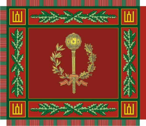 Pajėgų vadovybės vėliava